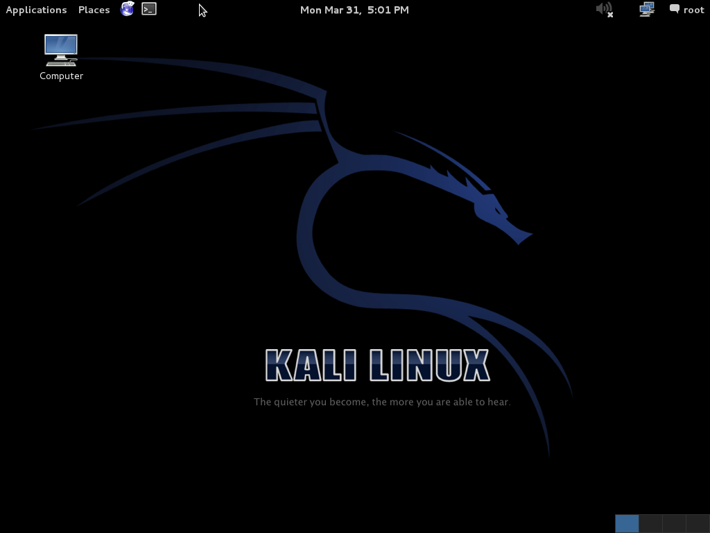 Desktop di Kali Linux